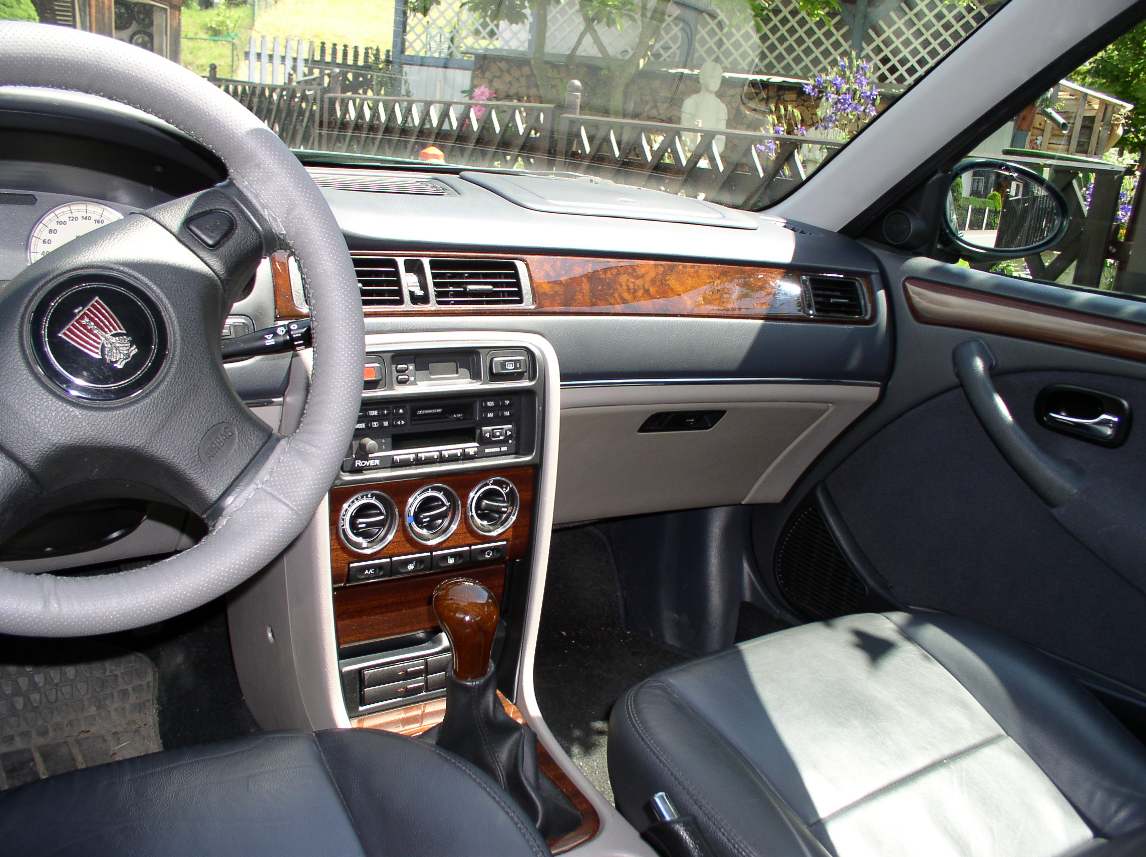 Rover 45 Baujahr 2003 1,8 L Innenraum Celeste